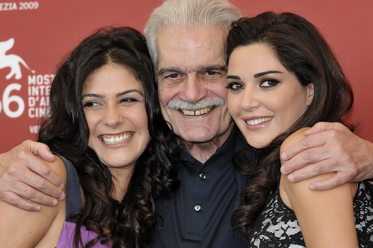 66ème Festival du Cinéma de Venise (Mostra), 9ème jour (10/09/2009) Photocall avec Omar Sharif et Cyrine AbdelNour pour le film The Traveller de Ahmed Maher